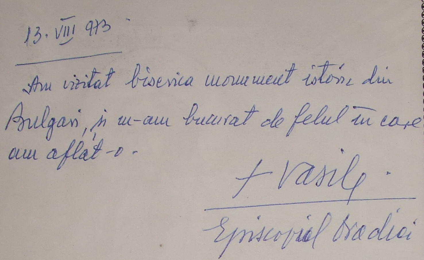 Biserica de lemn din Bulgari, judeţul Sălaj. Înscris pe Evanghelia bisericii, la trecerea P.S. Vasile al Oradiei, în 1973.